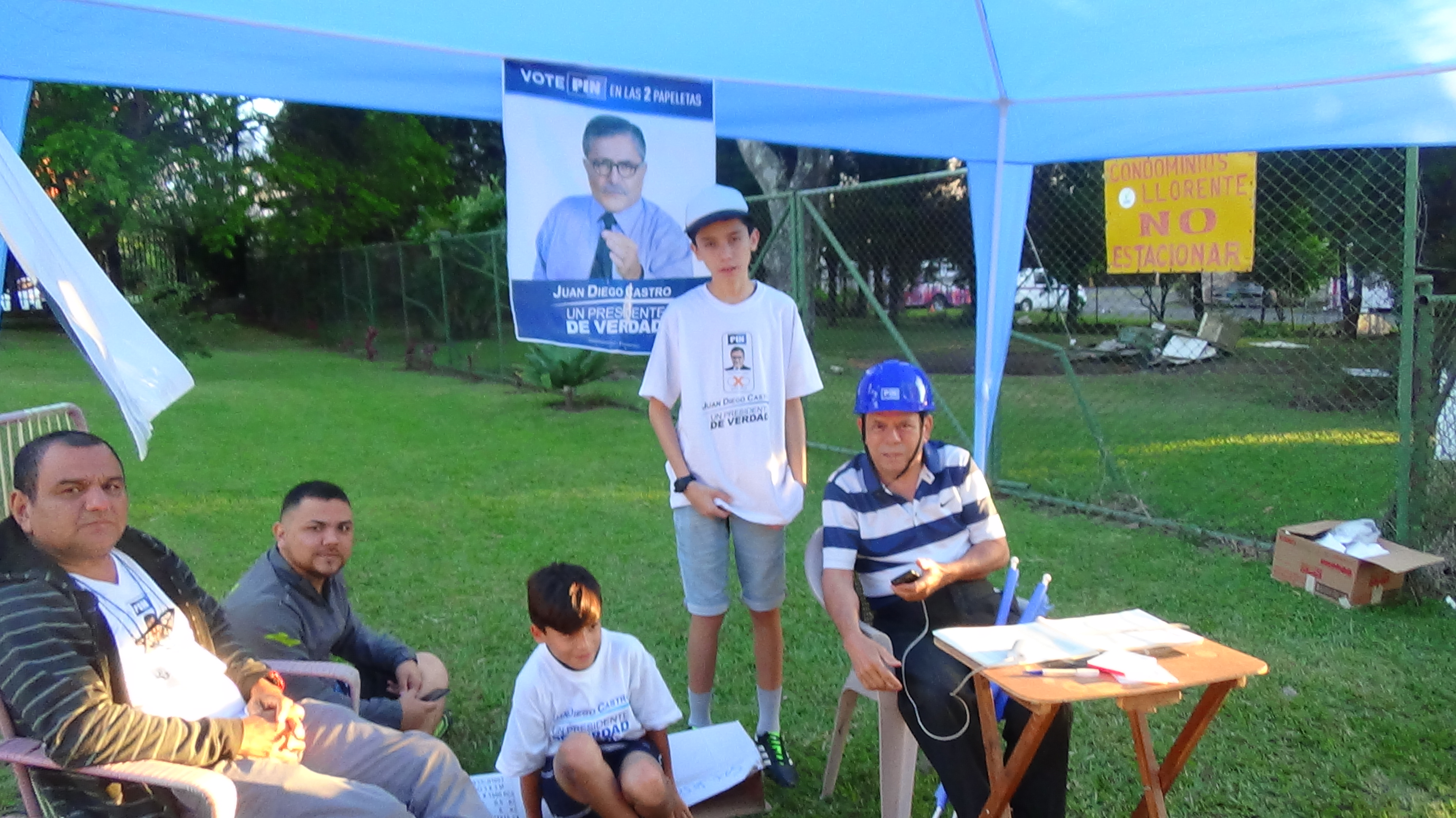 Simpatizantes de Juan Diego Castro